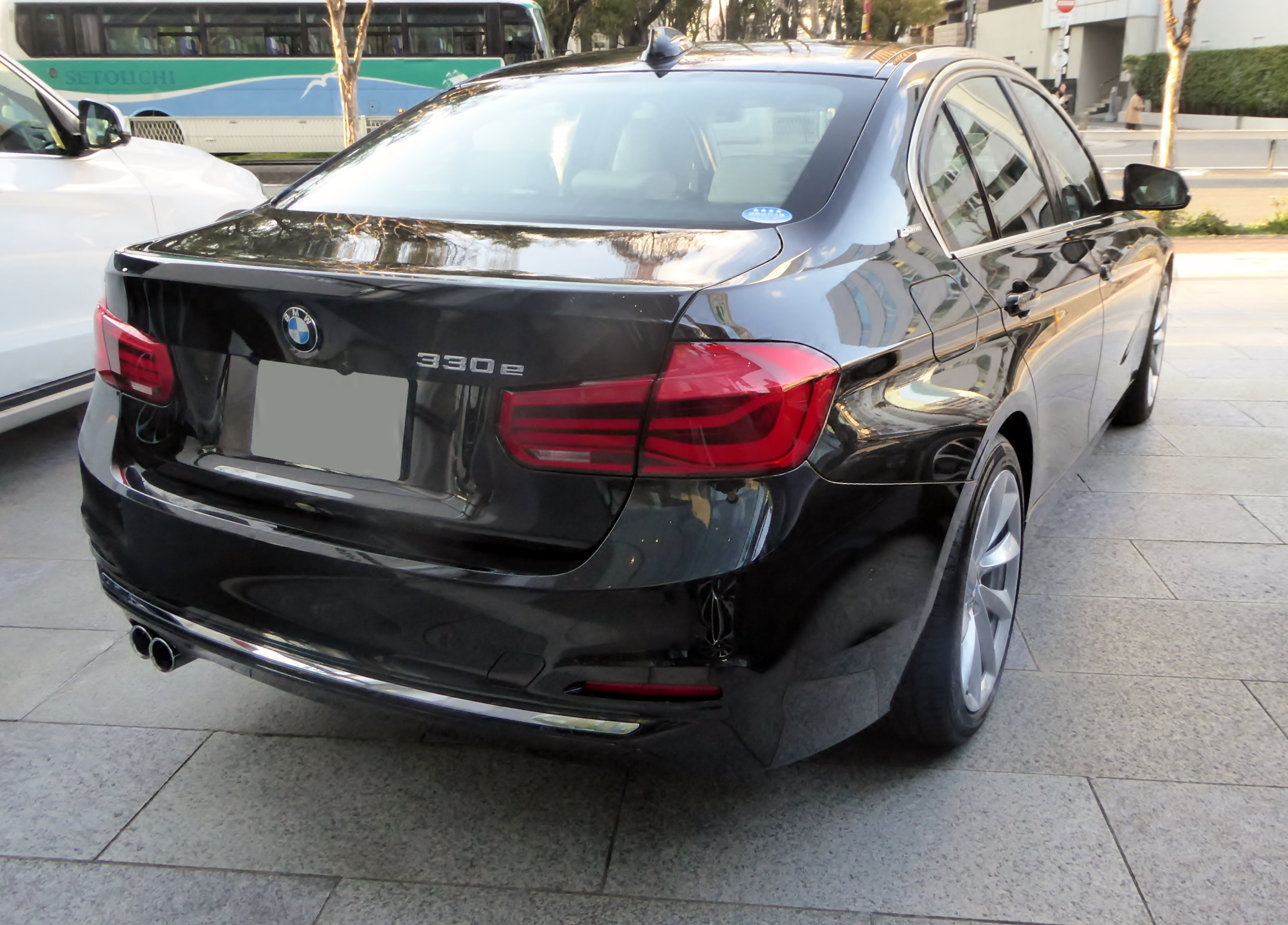 F30型BMW・330eをリアから撮影。